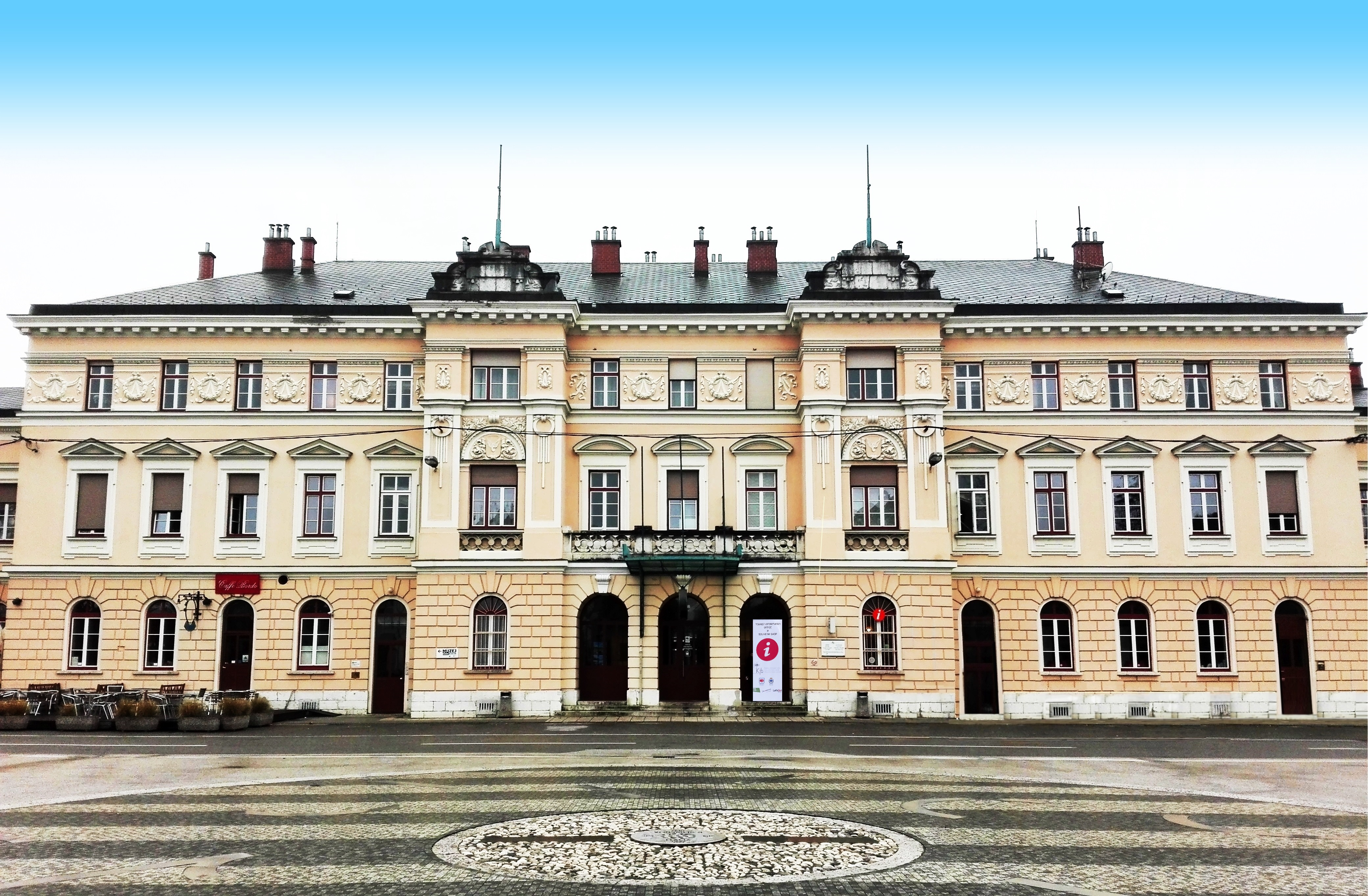 La stazione ferroviaria di Nova Gorica.